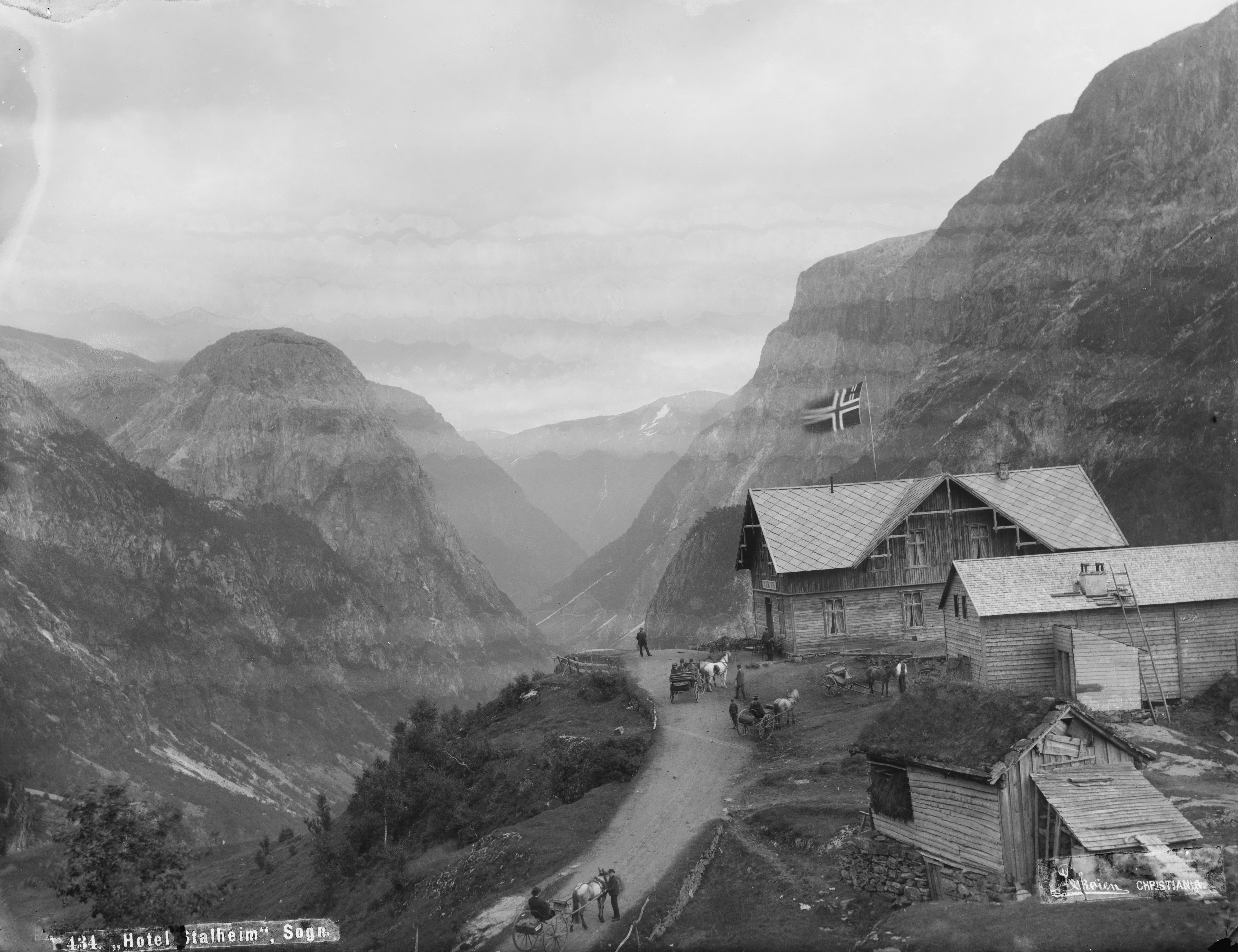 Skøiens katalog: Hotel Stalheim med Jordalsnuten Påskrift negativ: 434 Hotel Stalheim, Sogn Skøien Christiania Påskrift negativ: 281 Stalheim hotel [Riksantikvaren] Påskrift konvolutt: B-281 Vossestrand Stalheim hotel (I) [Riksantikvaren] Sted: Nærøydalen,Stalheim Kommune: Voss Fylke: Hordaland Tagger: landskap fjell dalføre utsikt hotell Stalheim hotel